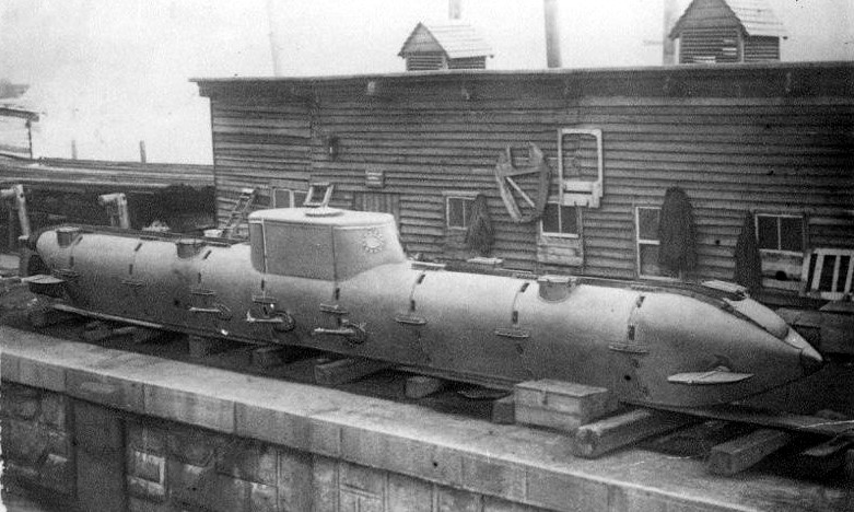 Россия. Подводная лодка 'Петр Кошка' изобретателя Е.Колбасьева. Около 1901г.